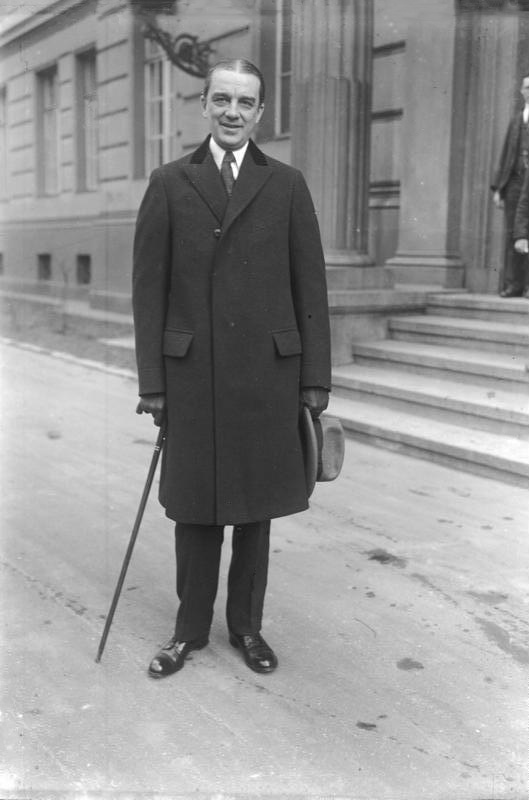 Neueste Aufnahmen der Führer der Sachverständigen-Kommission in Berlin. Der bekannte amerikanische Finanzmann Orren D Young .